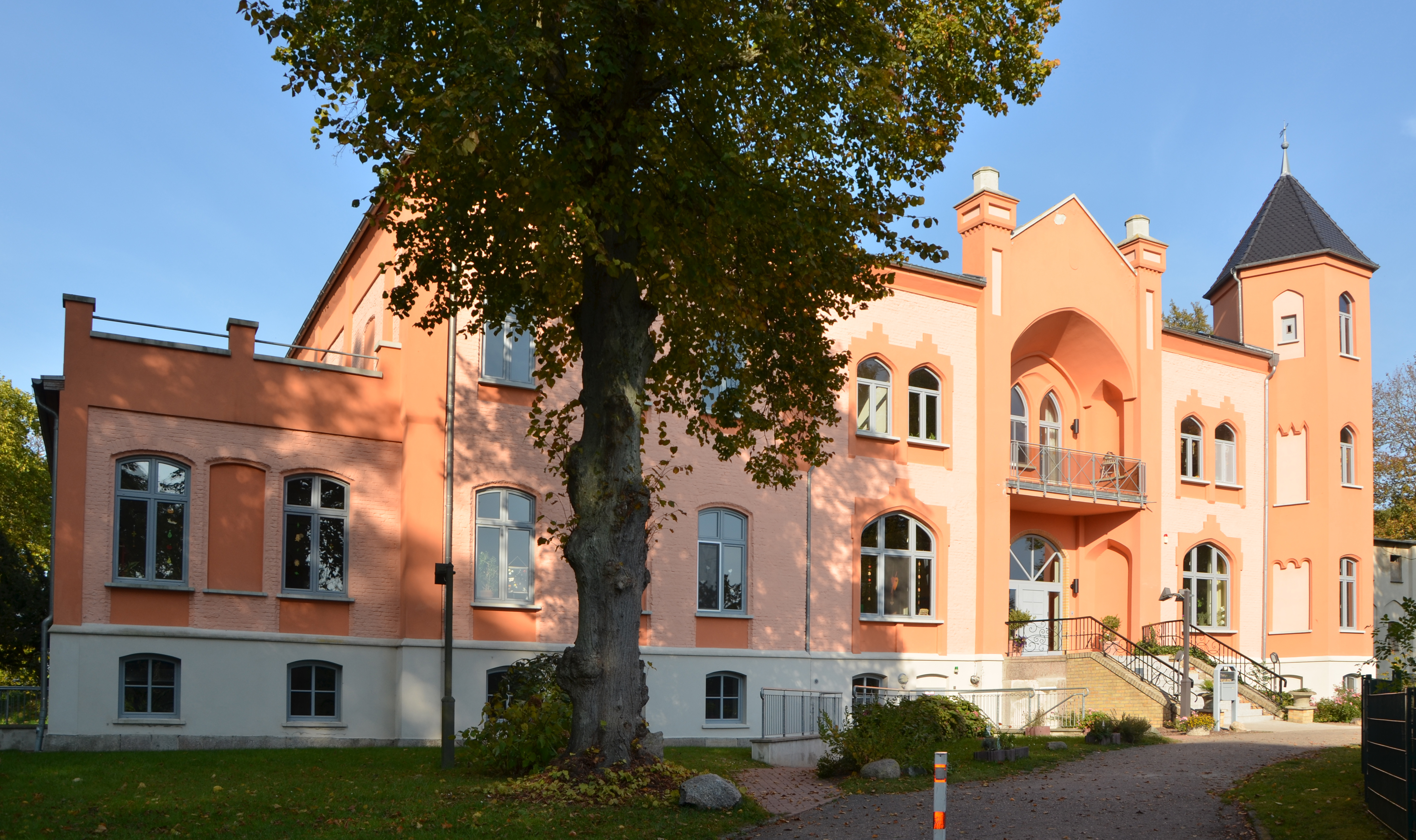 Schloss Ziesendorf